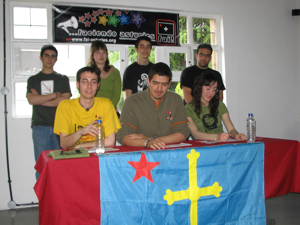 Fai!